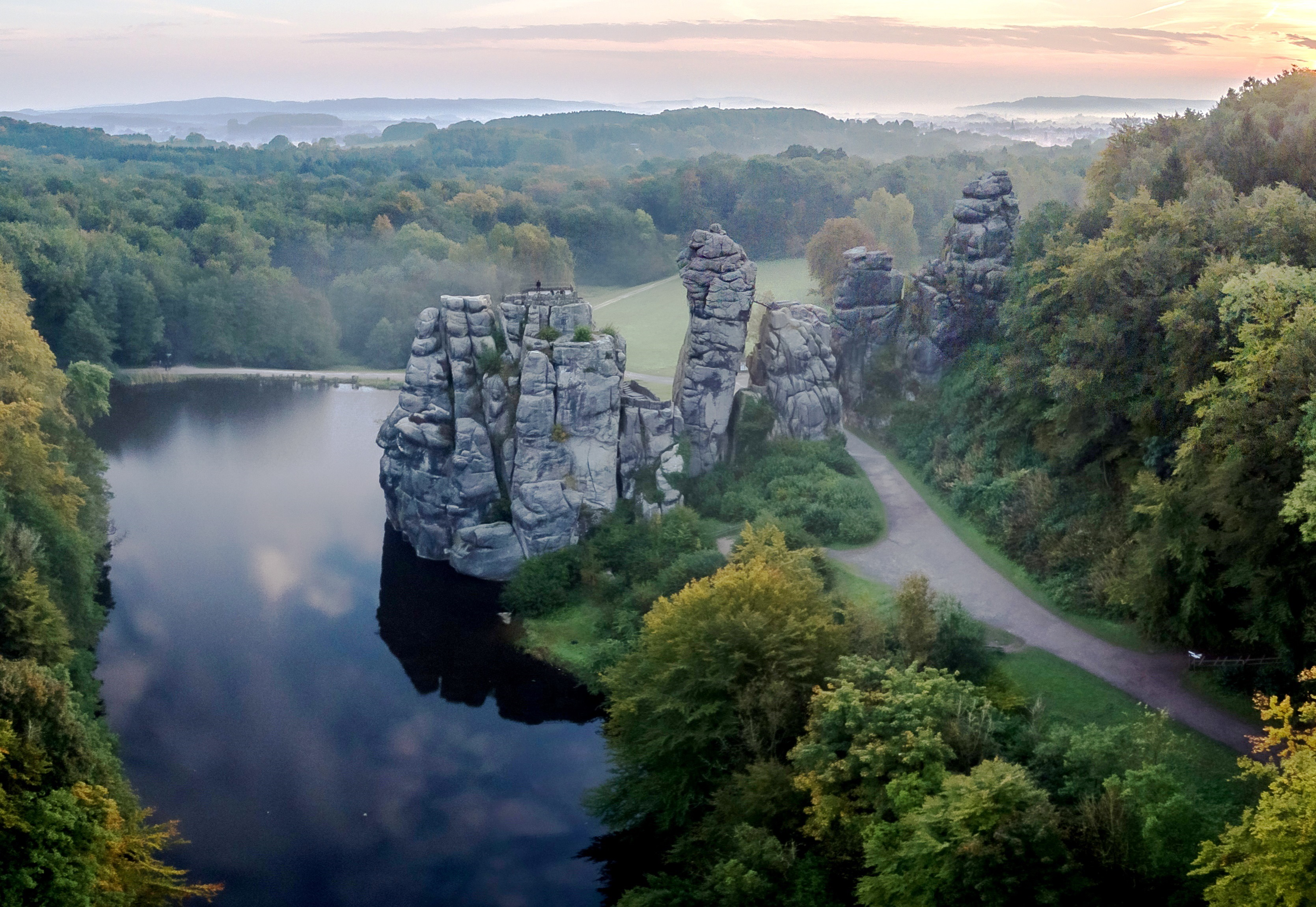 Blick auf die Externsteine aus der Luft bei Sonnenaufgang